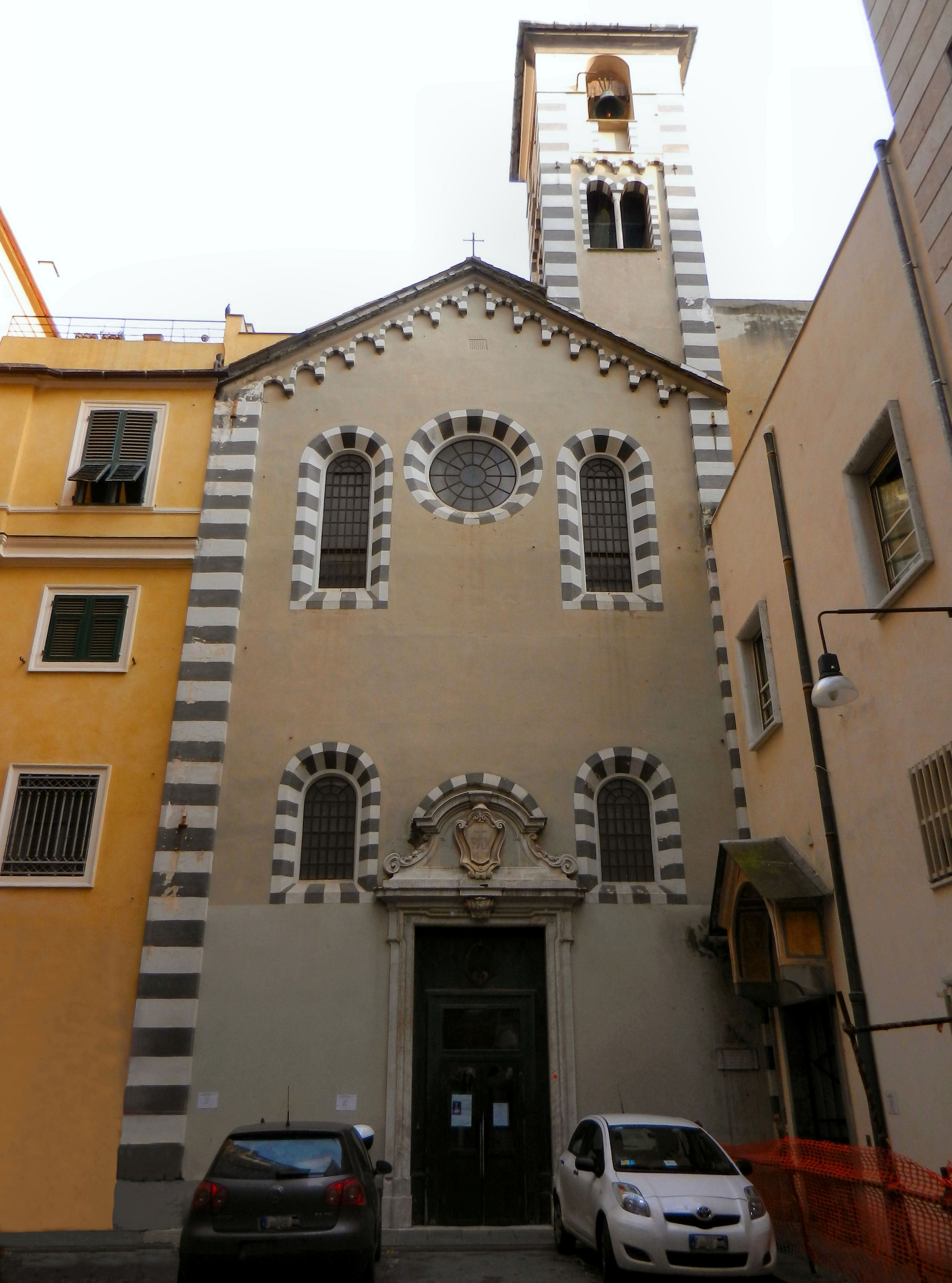 Genova, chiesa di santa Marta